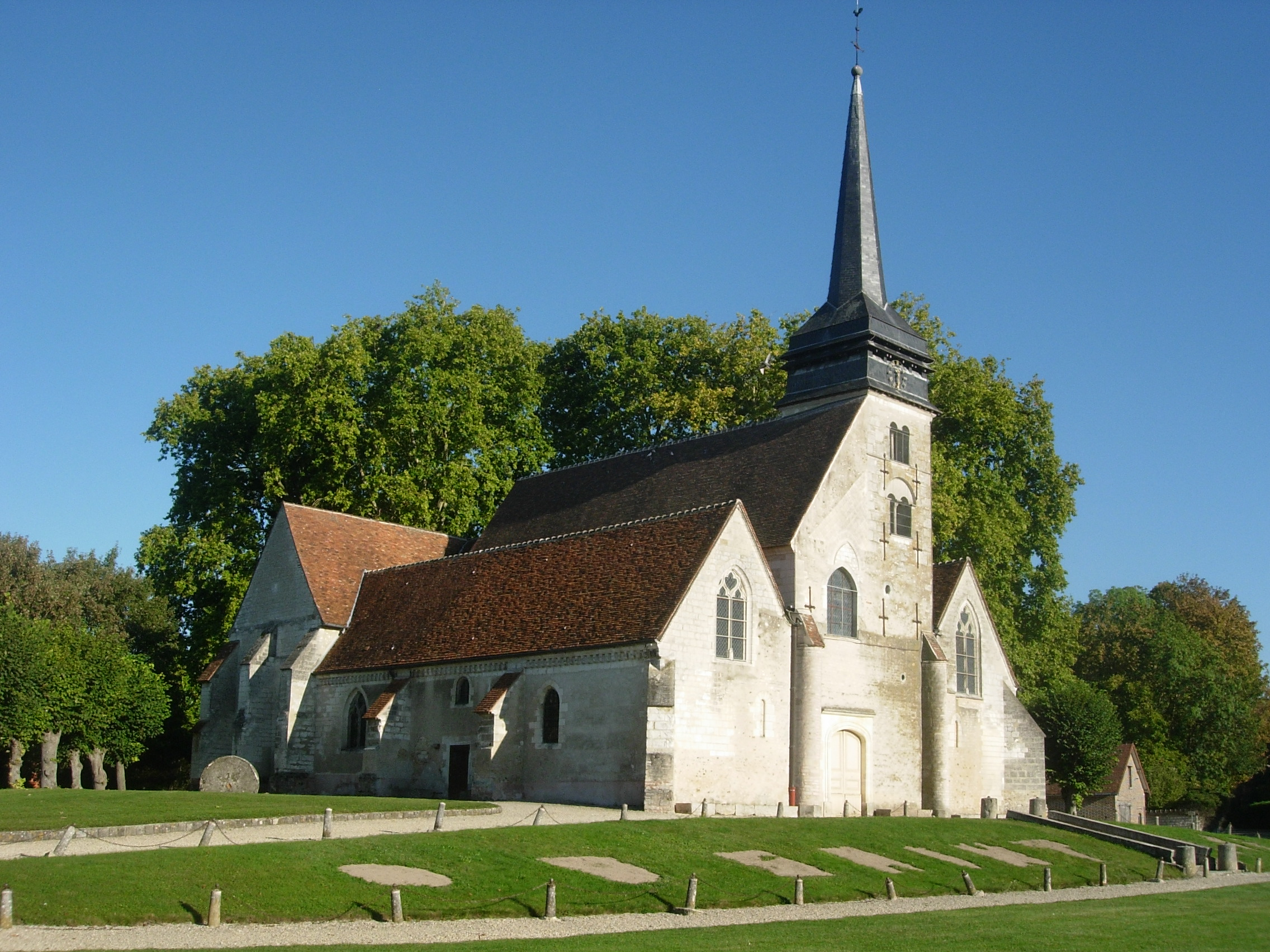 église de Saint-Lyé (Aube) .